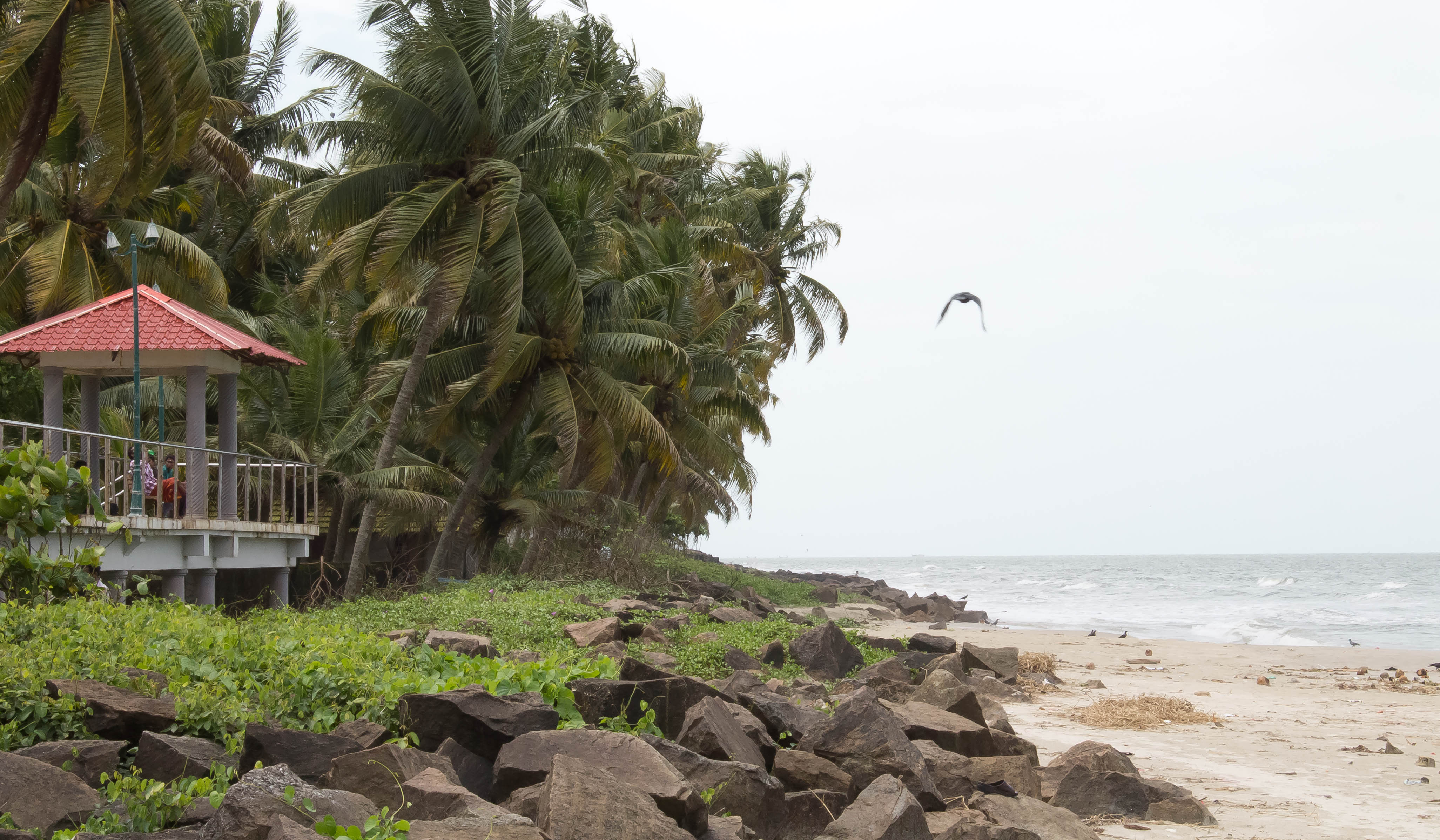 ബീച്ചും കടലാക്രമണം തടയാനുള്ള സംരക്ഷണഭിത്തിയും വെയിലേൽക്കാതെ കടലിന്റെ ഭംഗി ആസ്വദിക്കാനായി നിർമിച്ച കൂടാരവും കാണാം.